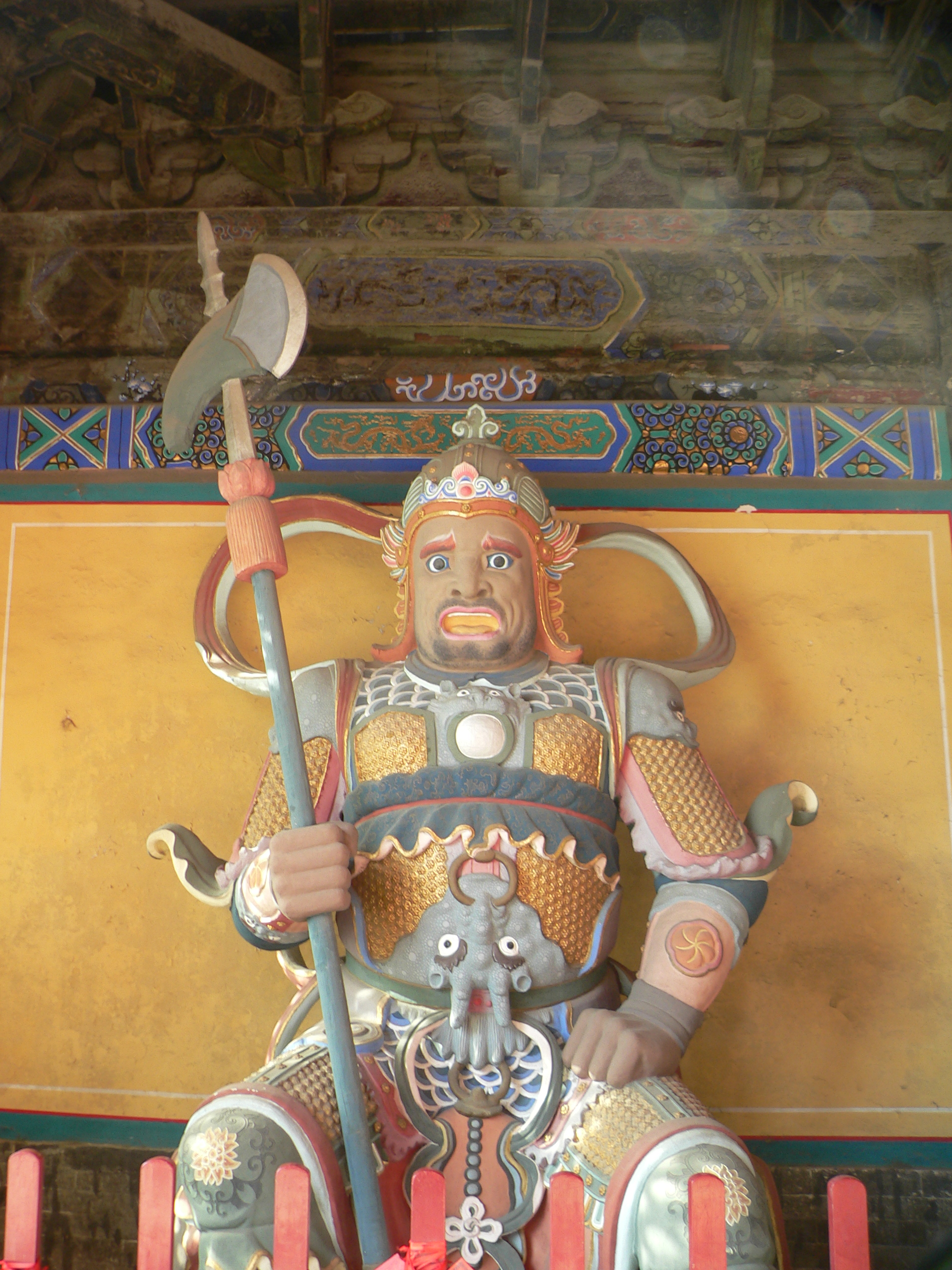 中文（中国大陆）: 哼哈二将之二